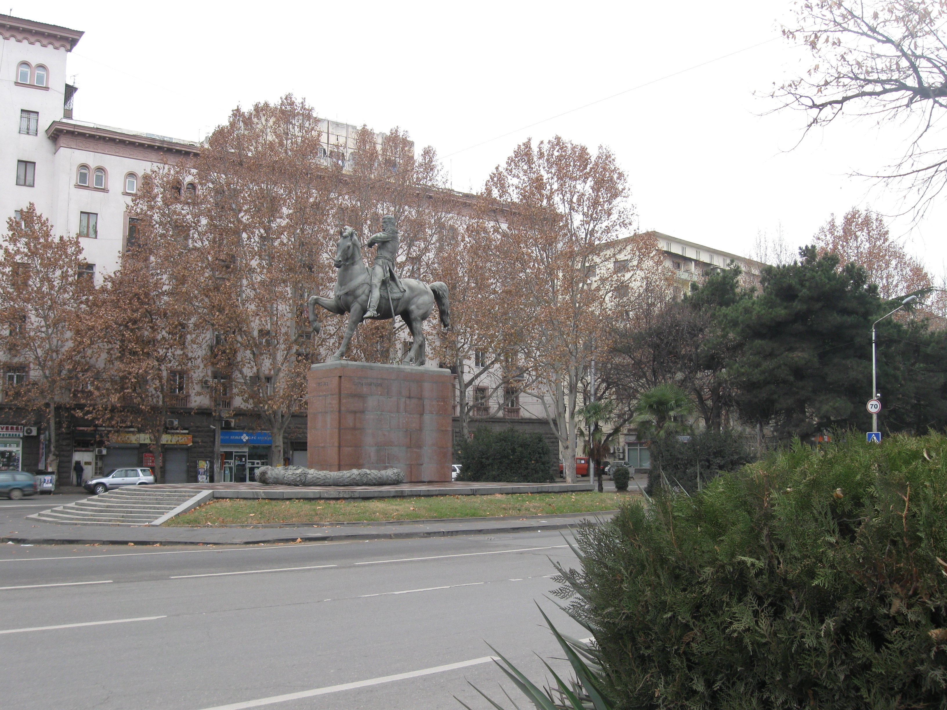 Գորգասալիի արձանը Օրտաճալայում